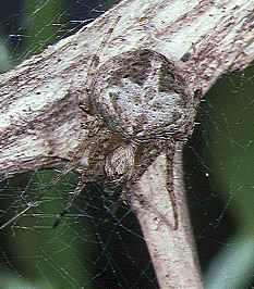 female Neoscona subpullata from Okinawa.